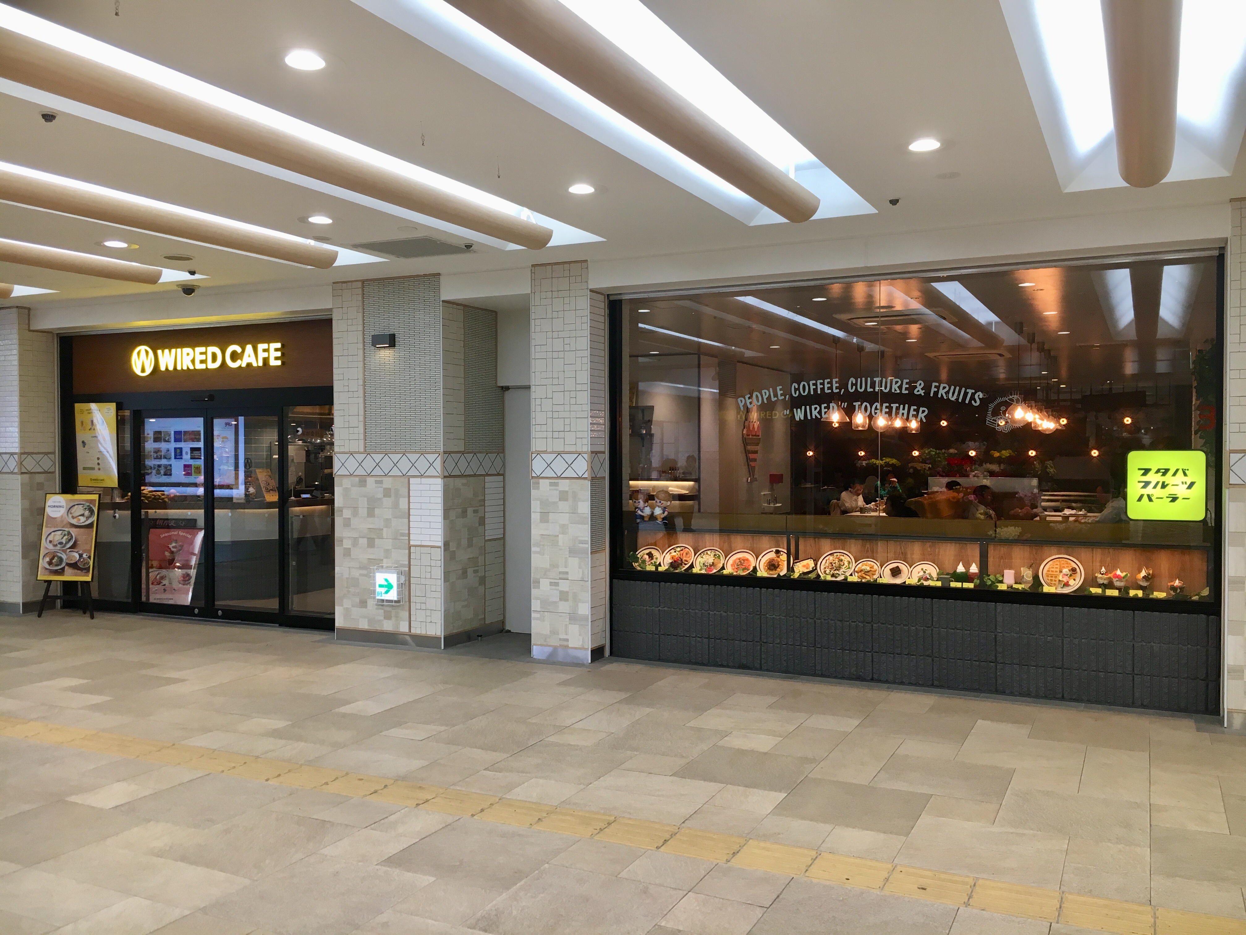 相鉄線三ツ境駅の駅ビル「相鉄ライフ 三ツ境」（三ツ境ライフ）。2018年のリニューアルにより、2階のコンコース沿いにオープンした「WIRED CAFE with フタバフルーツパーラー」。 ※リニューアル以前にロッテリアが出店していた場所